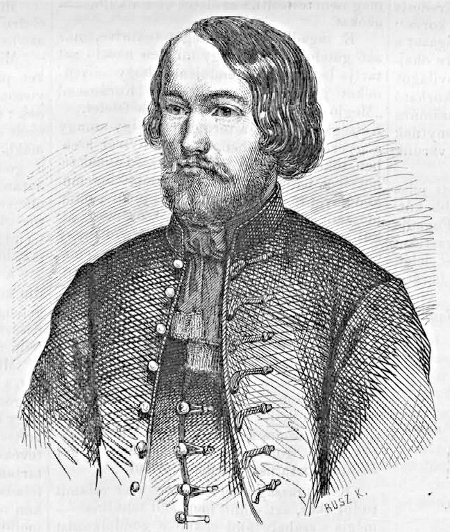 Dobozy Károly (1817–1860) zeneszerző. Rusz Károly metszete. (Vasárnapi Ujság, 1864. június 26.)